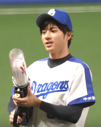 山田裕貴です。